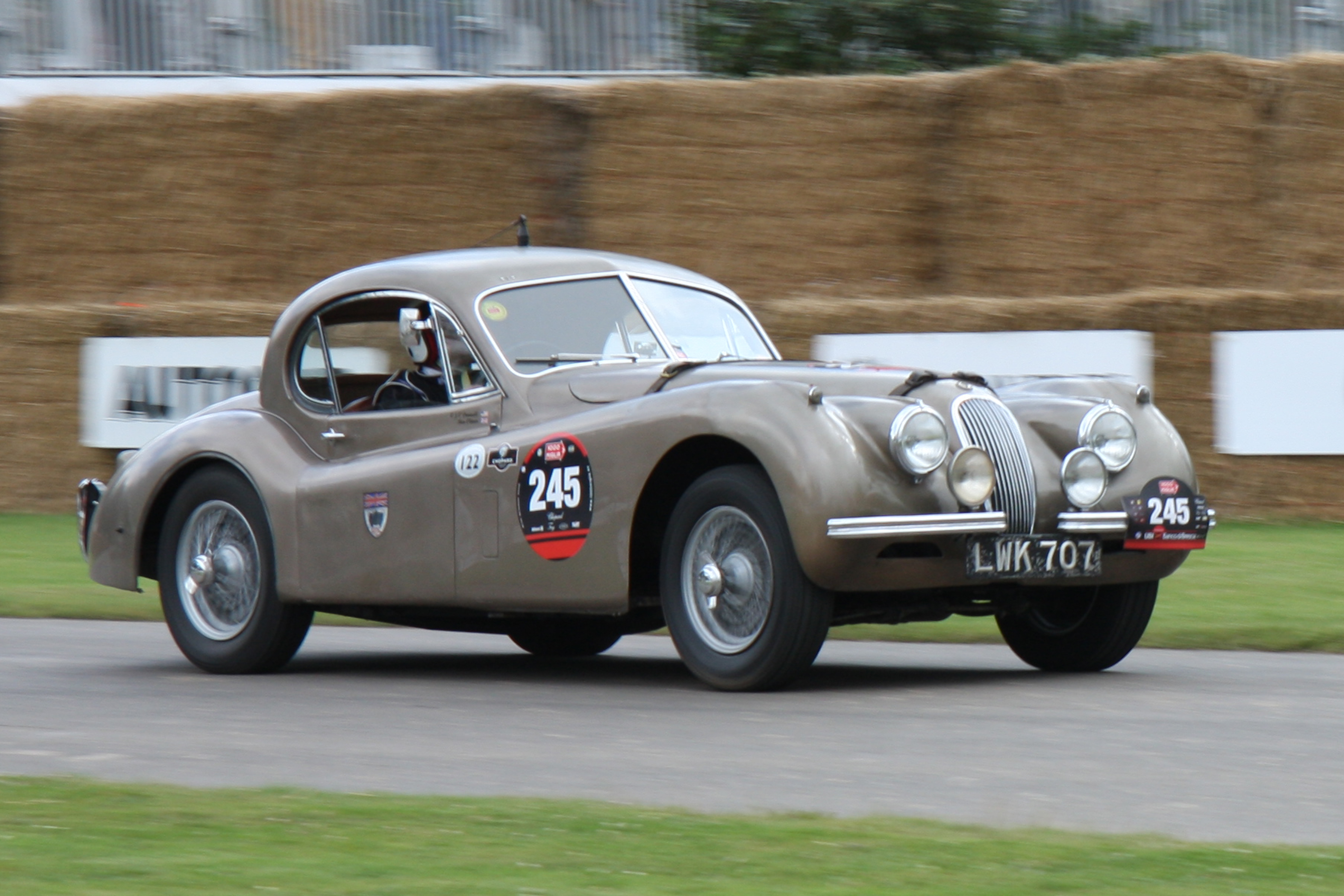 Built 1952. 3.4 litre 6 cylinder